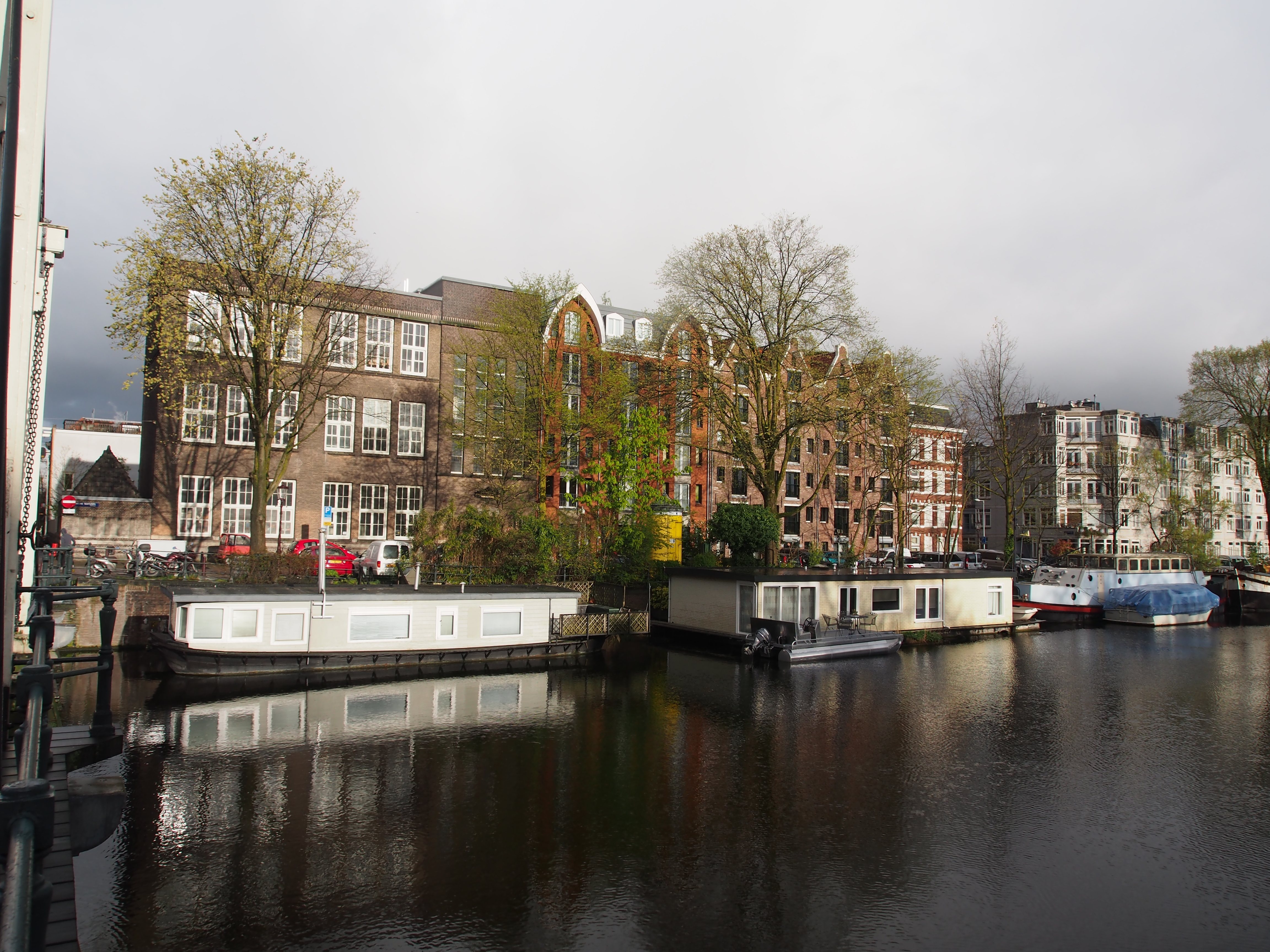 Photographed in Amsterdam, The Netherlands; links nog net een deel van de Sloterdijkbrug.